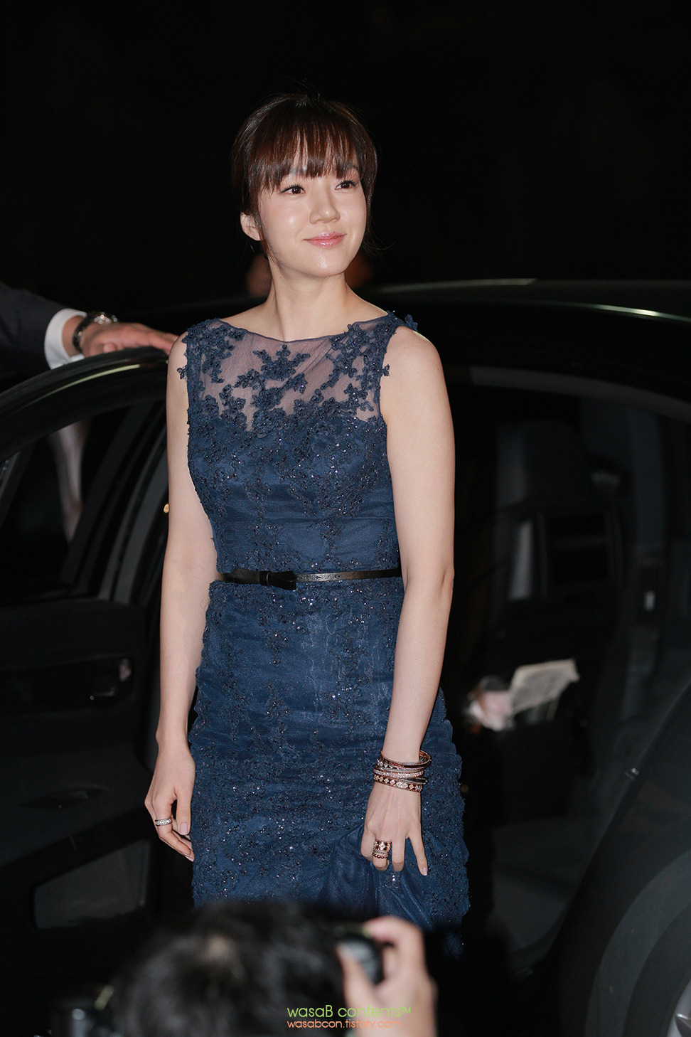 2013 청룡영화제